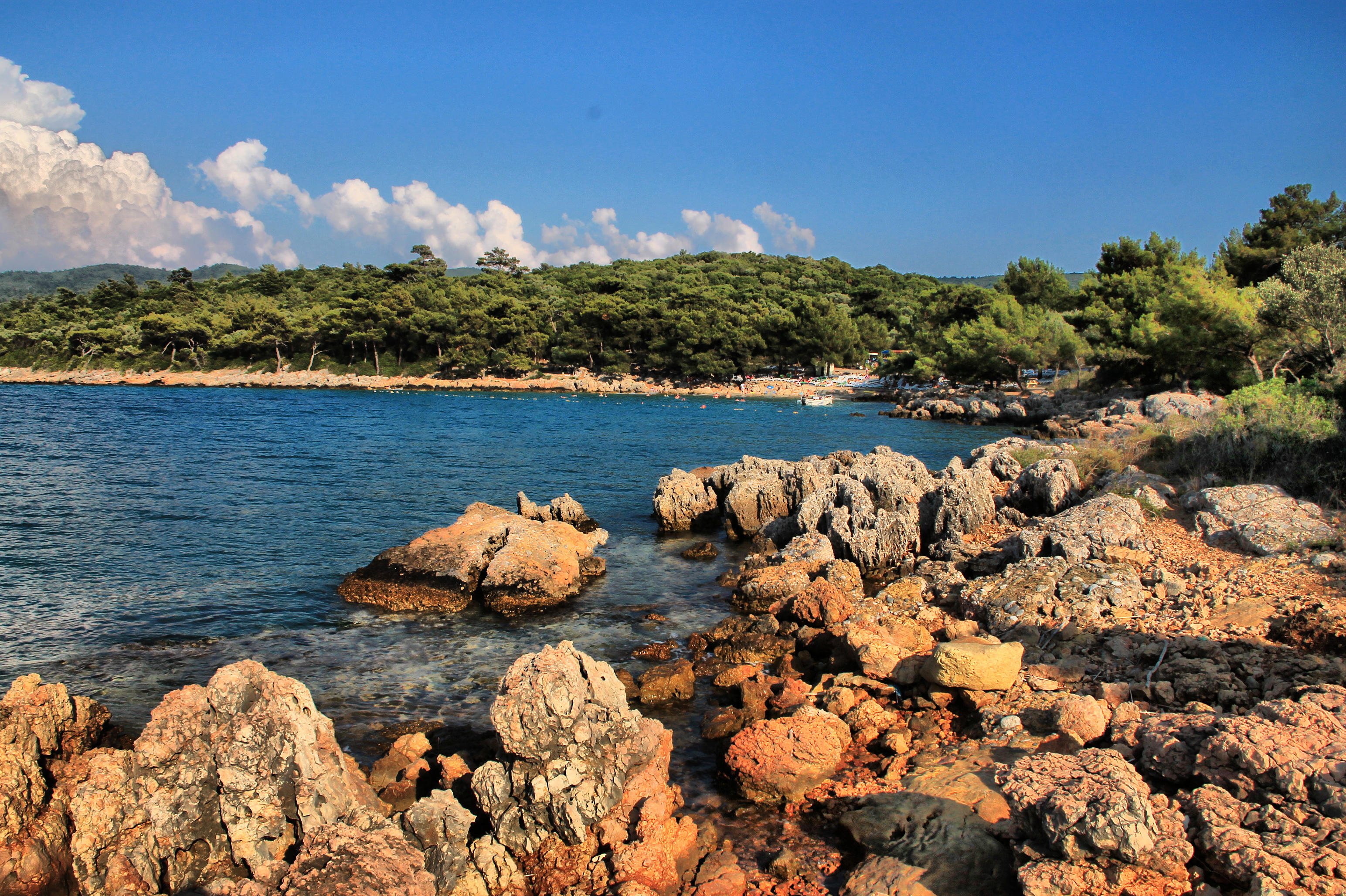 48700 Karaca/Marmaris/Muğla, Turkey